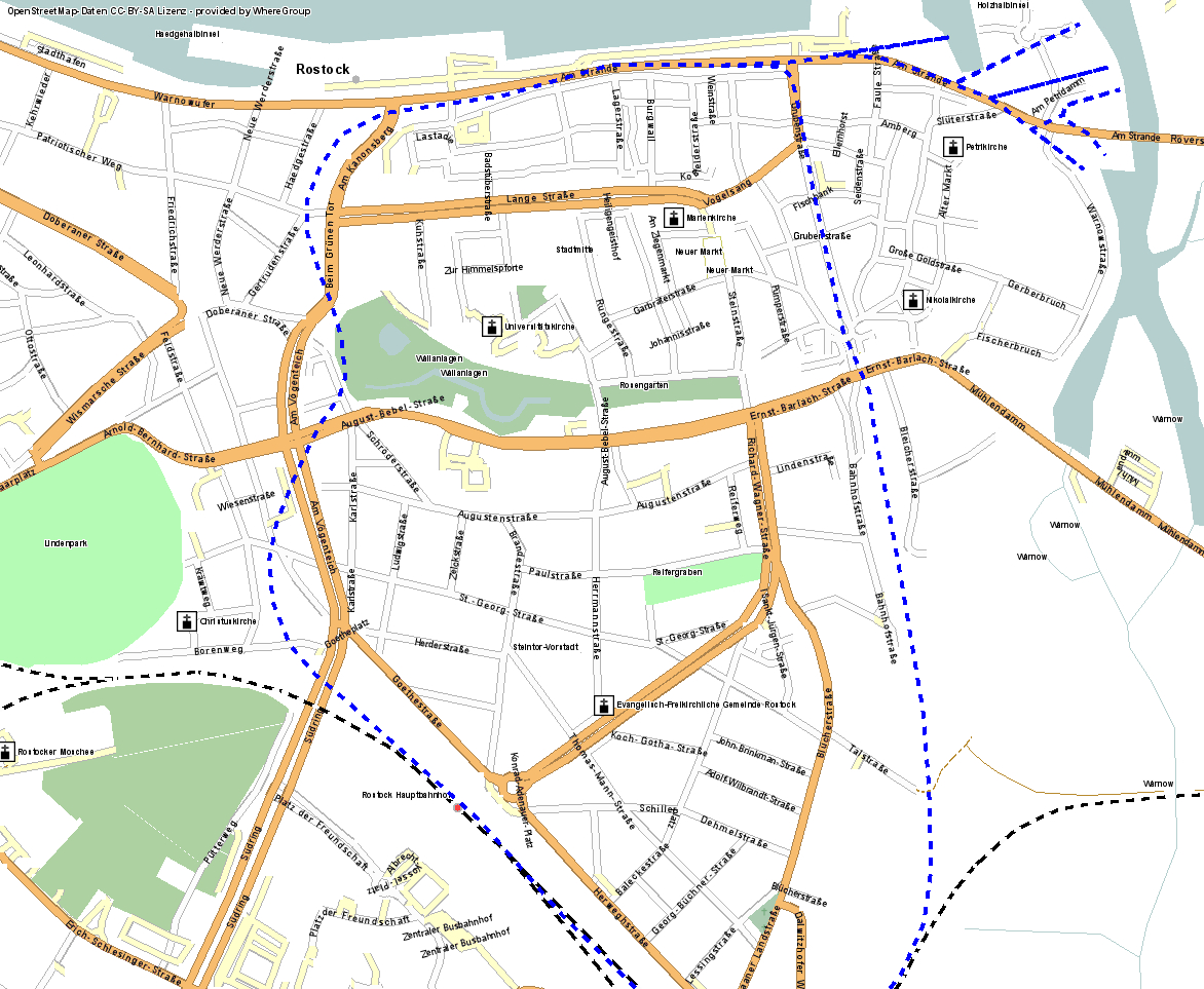 Streckenverlauf der Hafenbahn durch Rostock um 1918